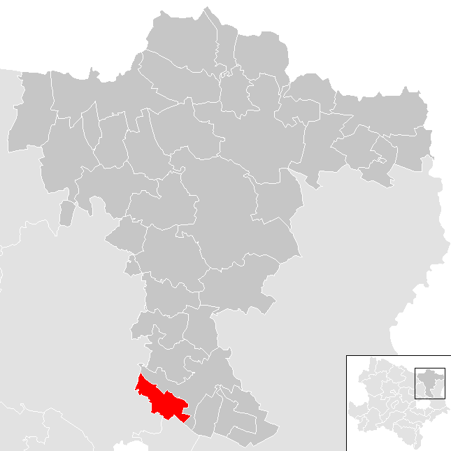 Bezirk Mistelbach